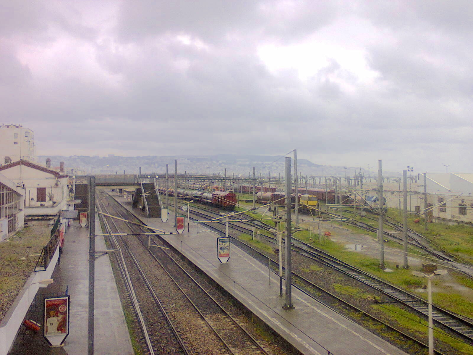 La gare ferroviaire d'Hussein Dey au premier plan, et les hauteurs de la ville d'Alger au fond de l'image, un jour de pluie en Algérie.